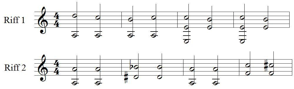 Hauptriffs von „Transilvanian Hunger“, Hörbeispiel nach Tabulatur